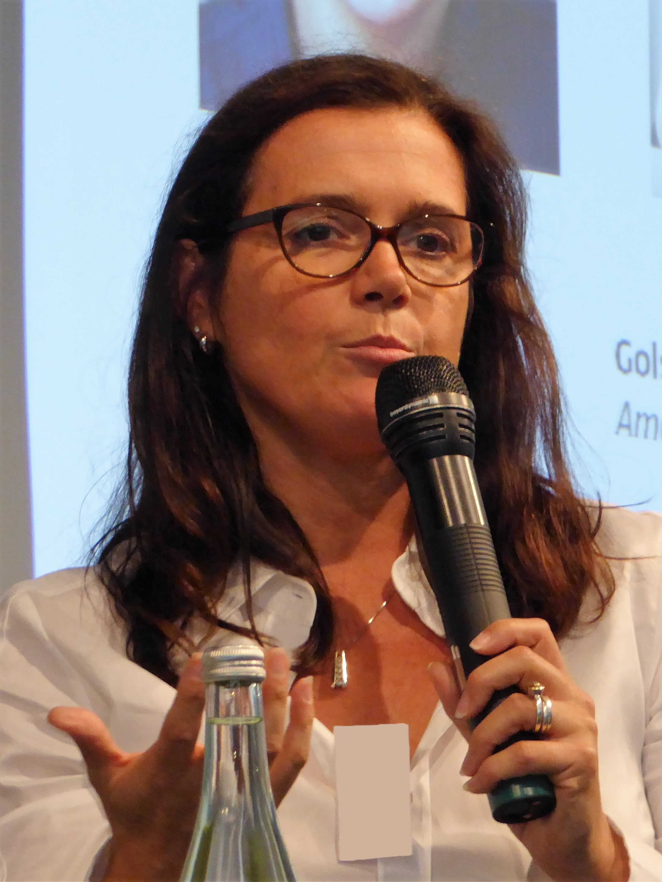 Barbara Junge (Journalistin) (* 1968 in Stuttgart) auf einer Podiumsdiskussion während der taz-Generalversammlung, am Samstag, den 17.09.2016, in der Heinrich-Böll-Stiftung in Berlin.